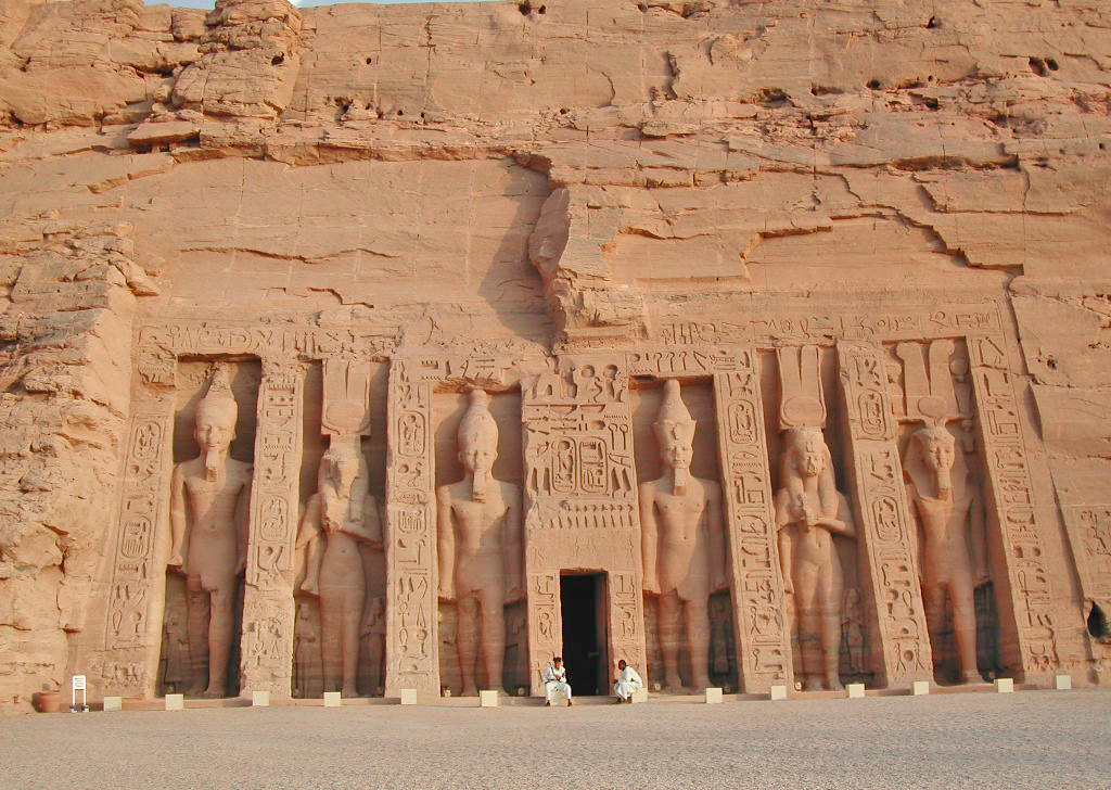 Figure virum Tempel vum Nefertari